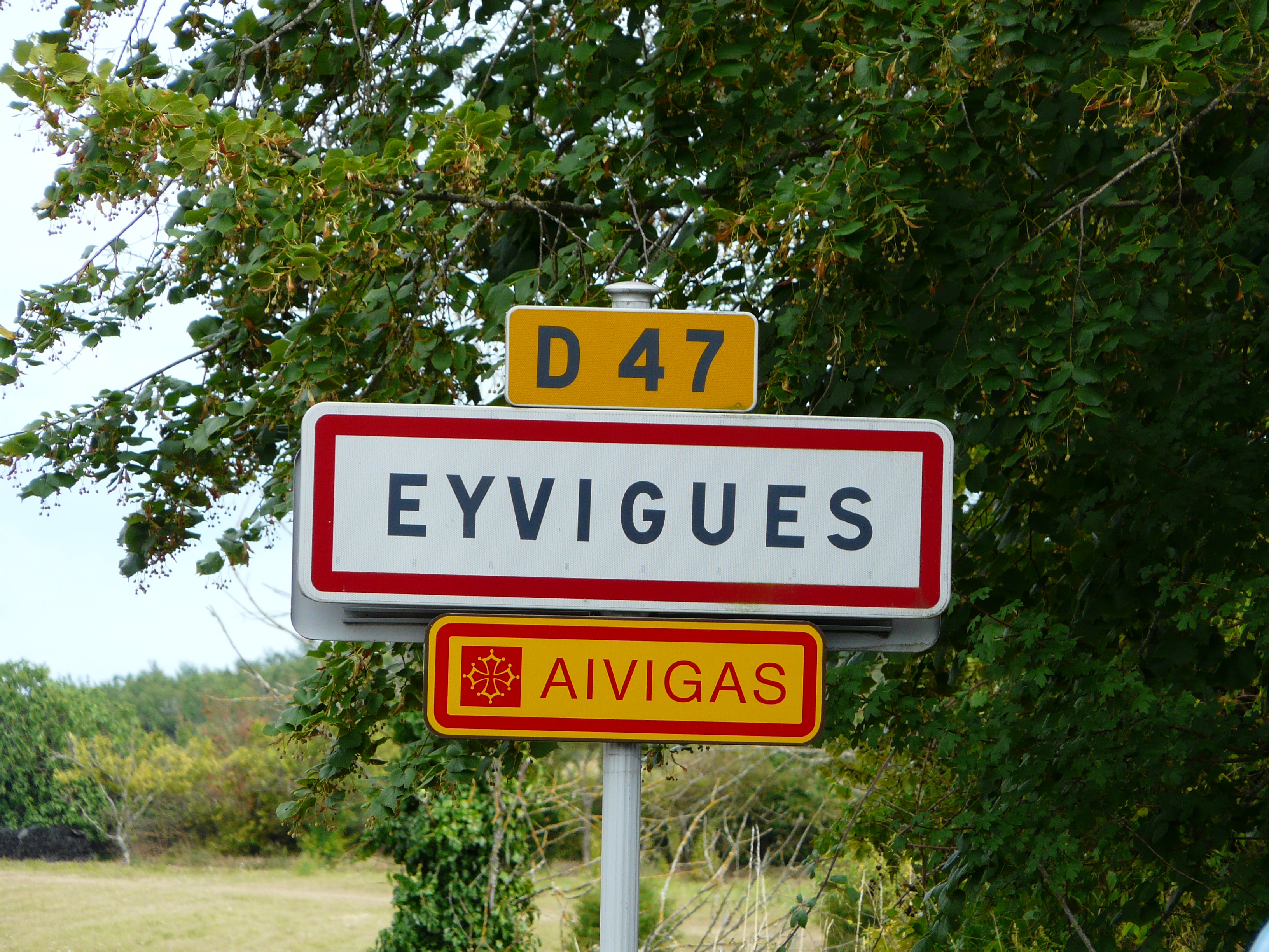 Panneau d'entrée dans Eyvigues, Salignac-Eyvigues, Dordogne, France.